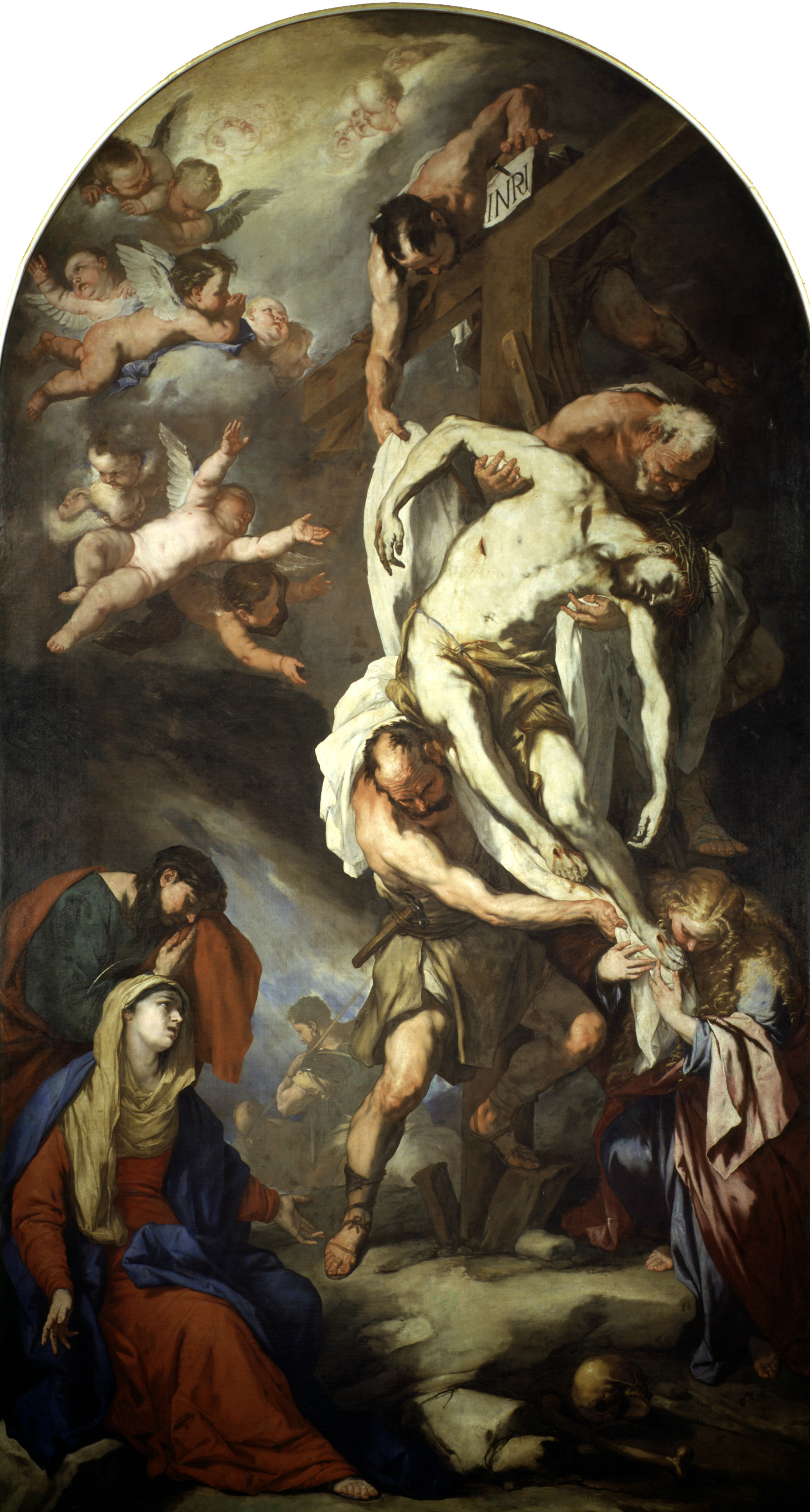 Deposizione